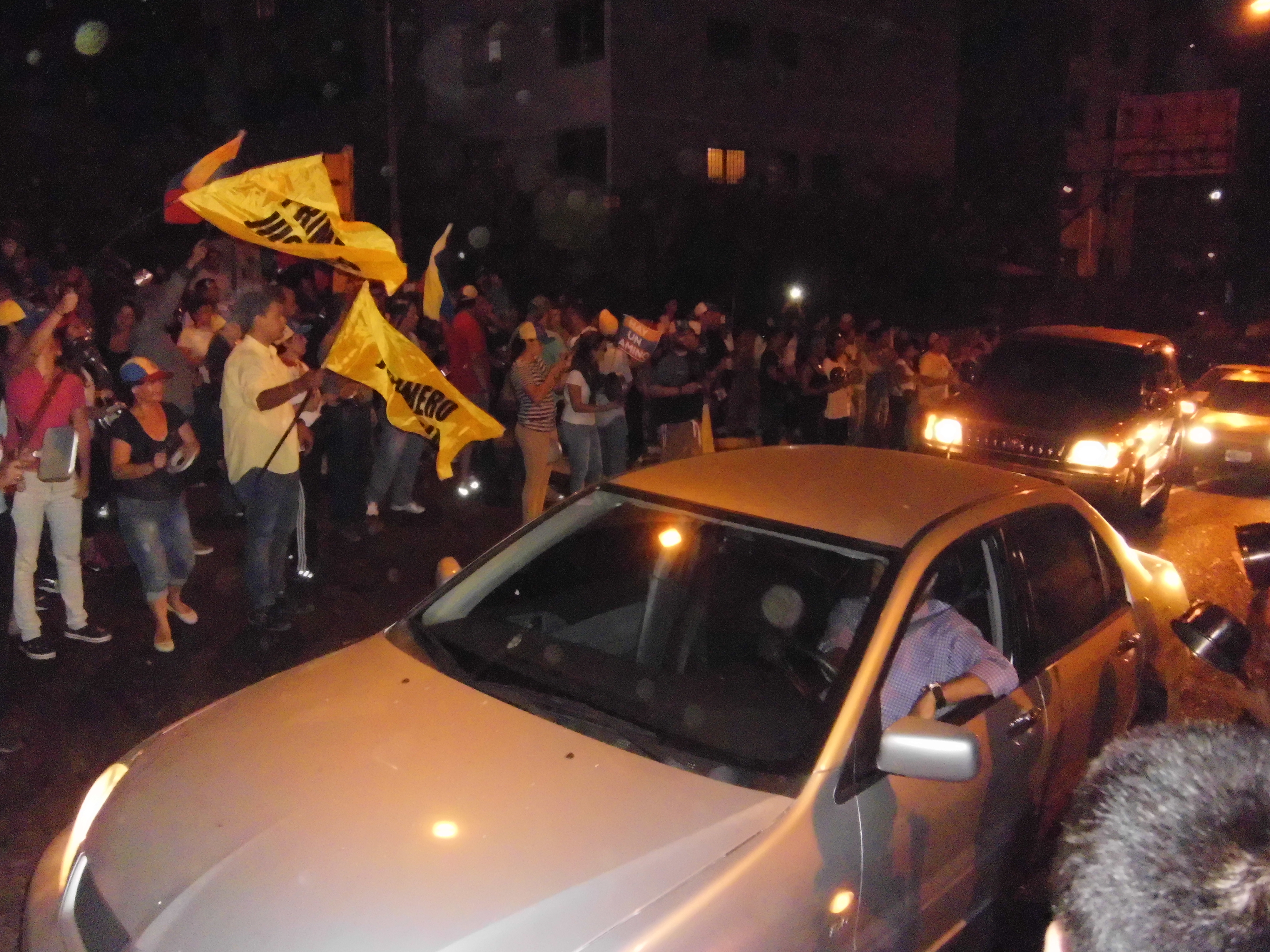 Cacerolazo contra Nicolás Maduro - La Boyera Municipio el Hatillo, Estado Miranda Venezuela día 15 de abril de 2013 hora 8:30 a 9:30 pm